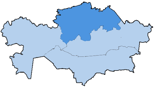 Mappa dell'arcidiocesi di Astana, in Kazakistan. Lavoro personale eseguito a partire da file:Kazakhstan provinces numbered english.png di Commons. Fonte per i confini delle diocesi: Guida delle missioni cattoliche 2005, a cura della Congregatio pro gentium evangelizatione, Roma, Urbaniana University Press, 2005.